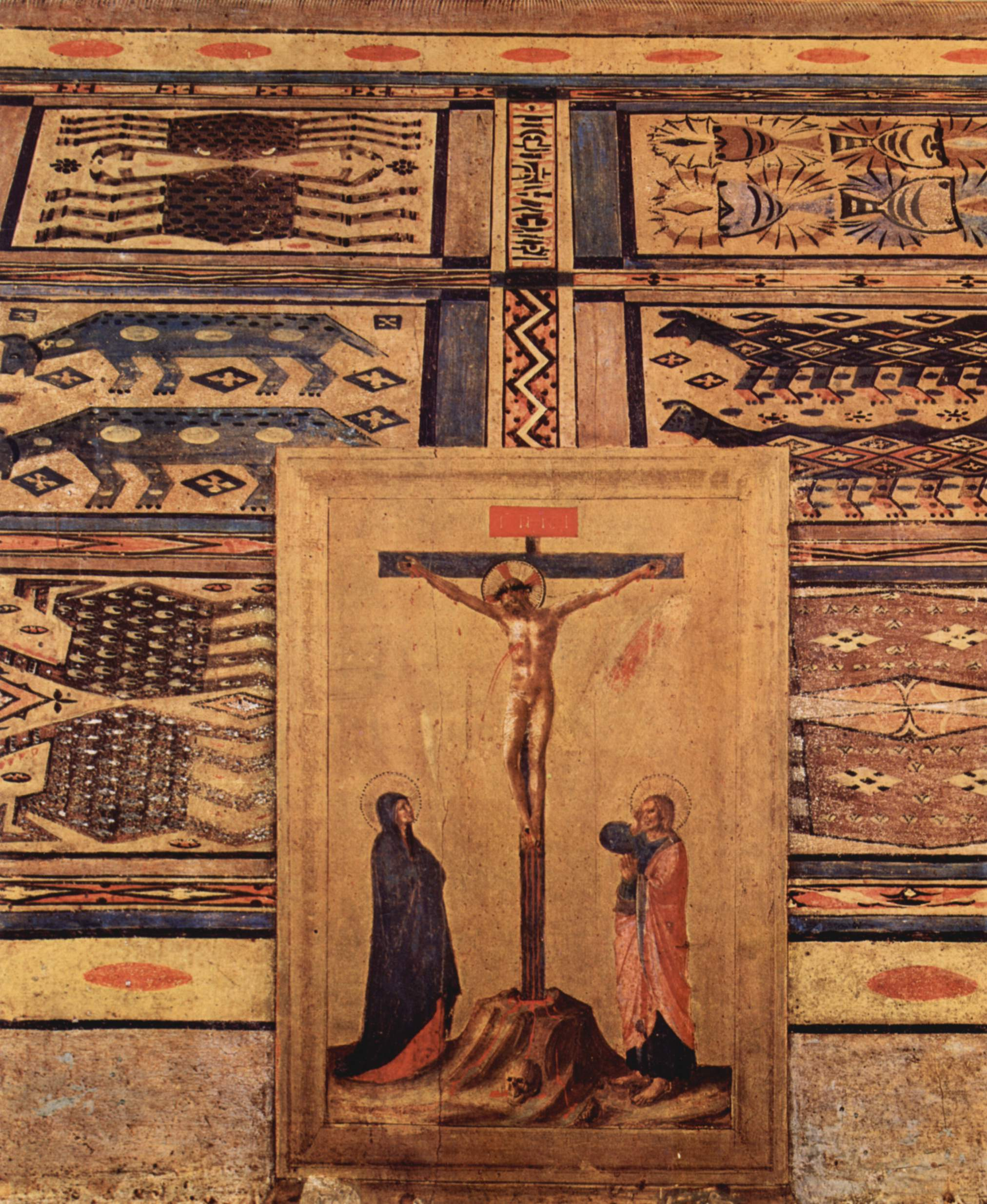 Hauptaltar der Heiligen Kosmas und Damian aus dem Dominikanerklosters San Marco in Florenz, Haupttafel: Thronende Madonna und Heilige, Detail: Kreuzigungsszene im Vordergrund